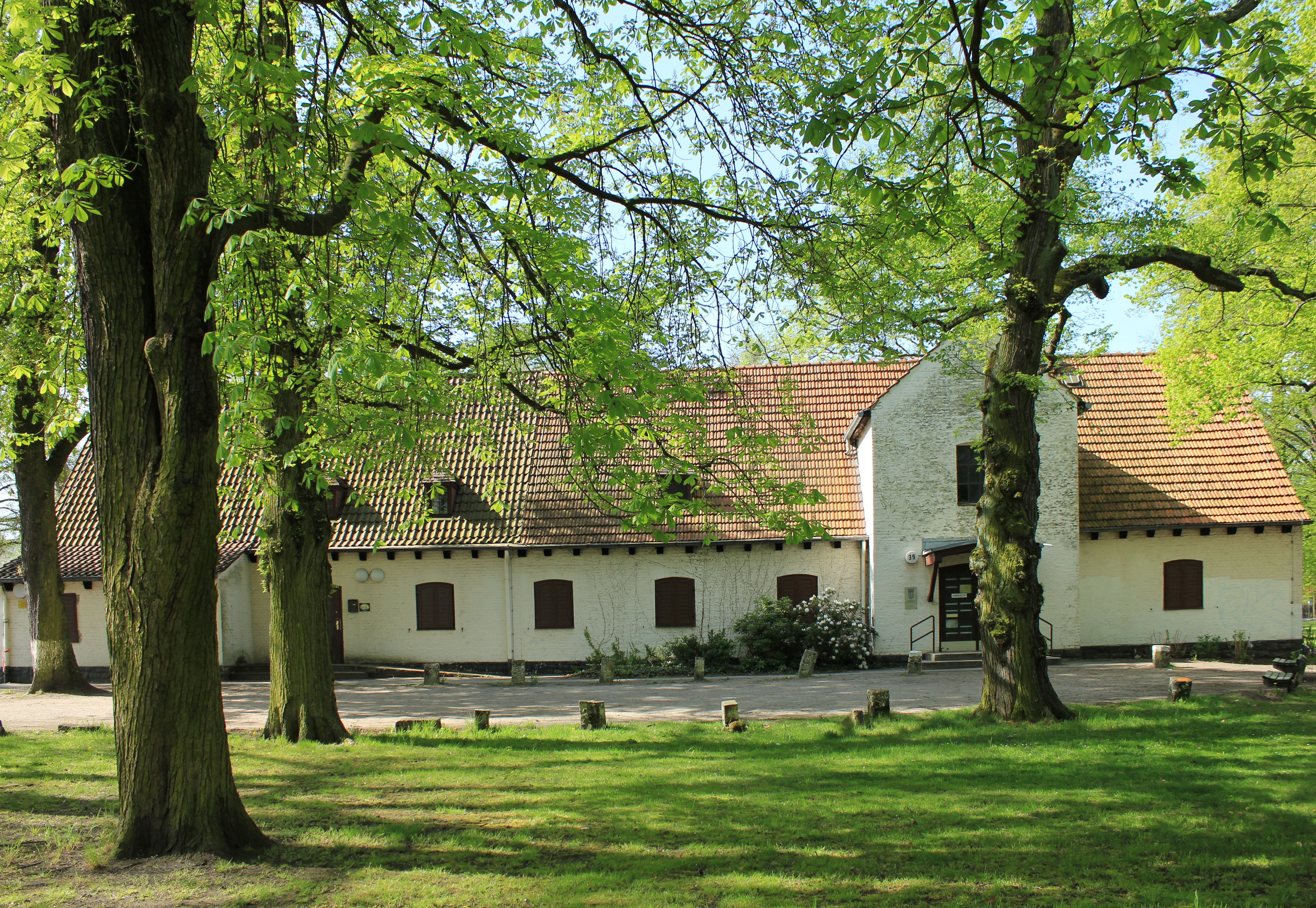 Heim der Hitlerjugend 1937-1939 von Karl Heinrich Hahn